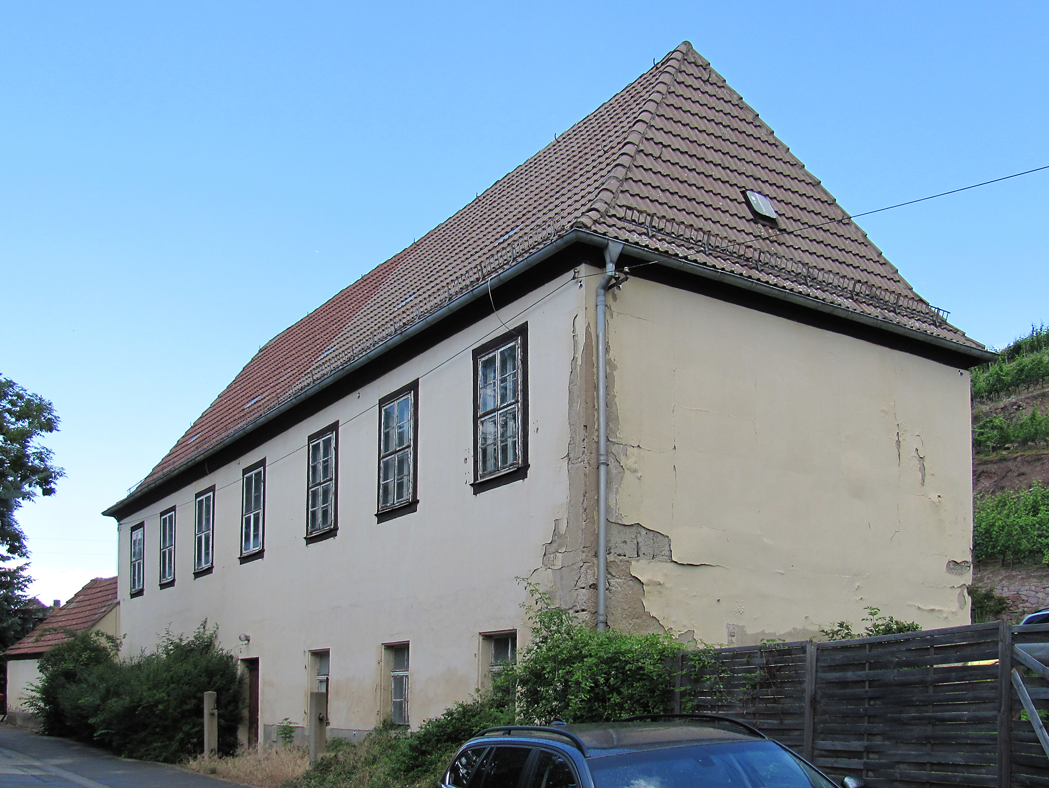 Radebeul, Traiteurhaus